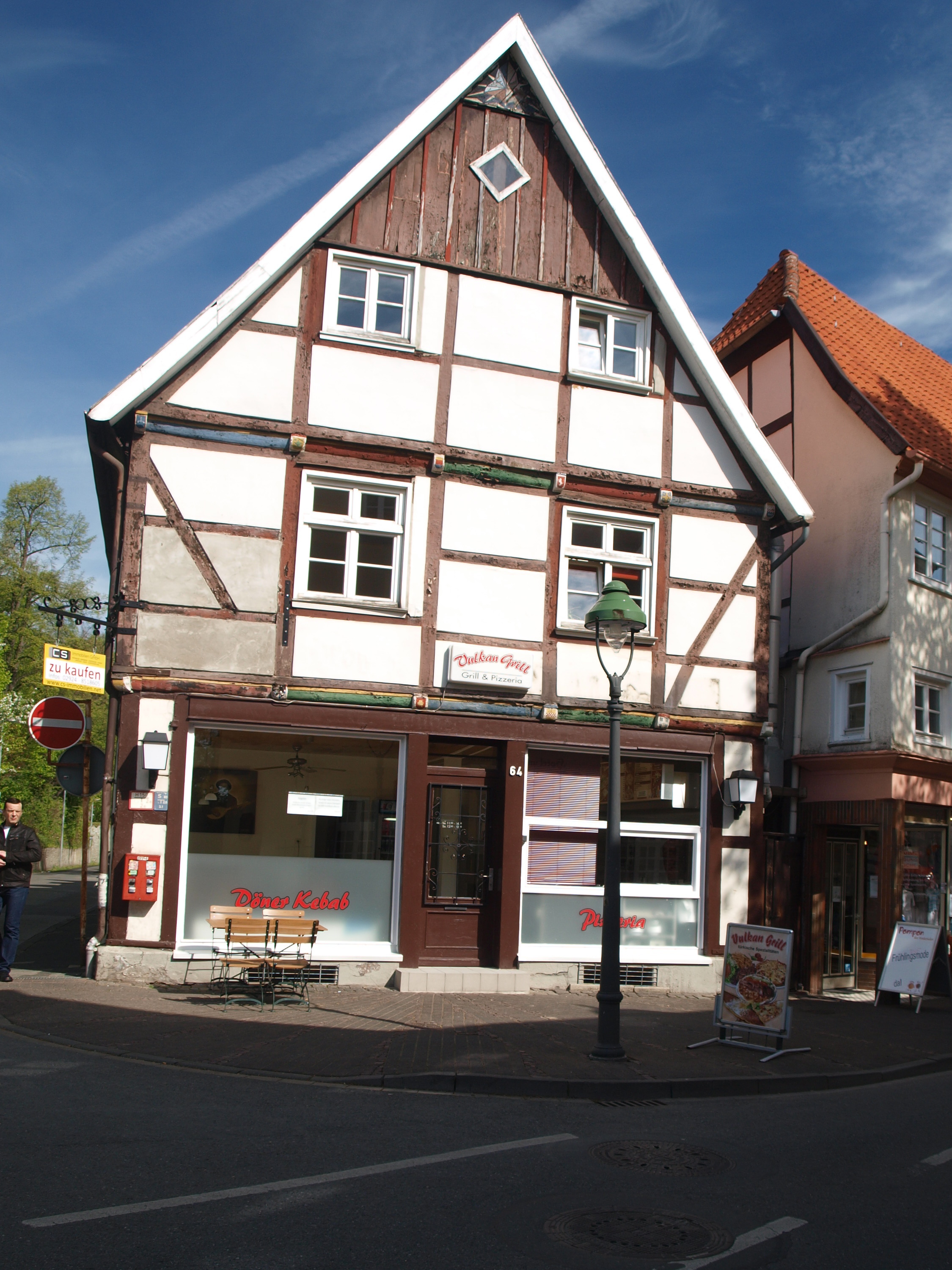 Stolpersteinlage Soest Jakobistr 64